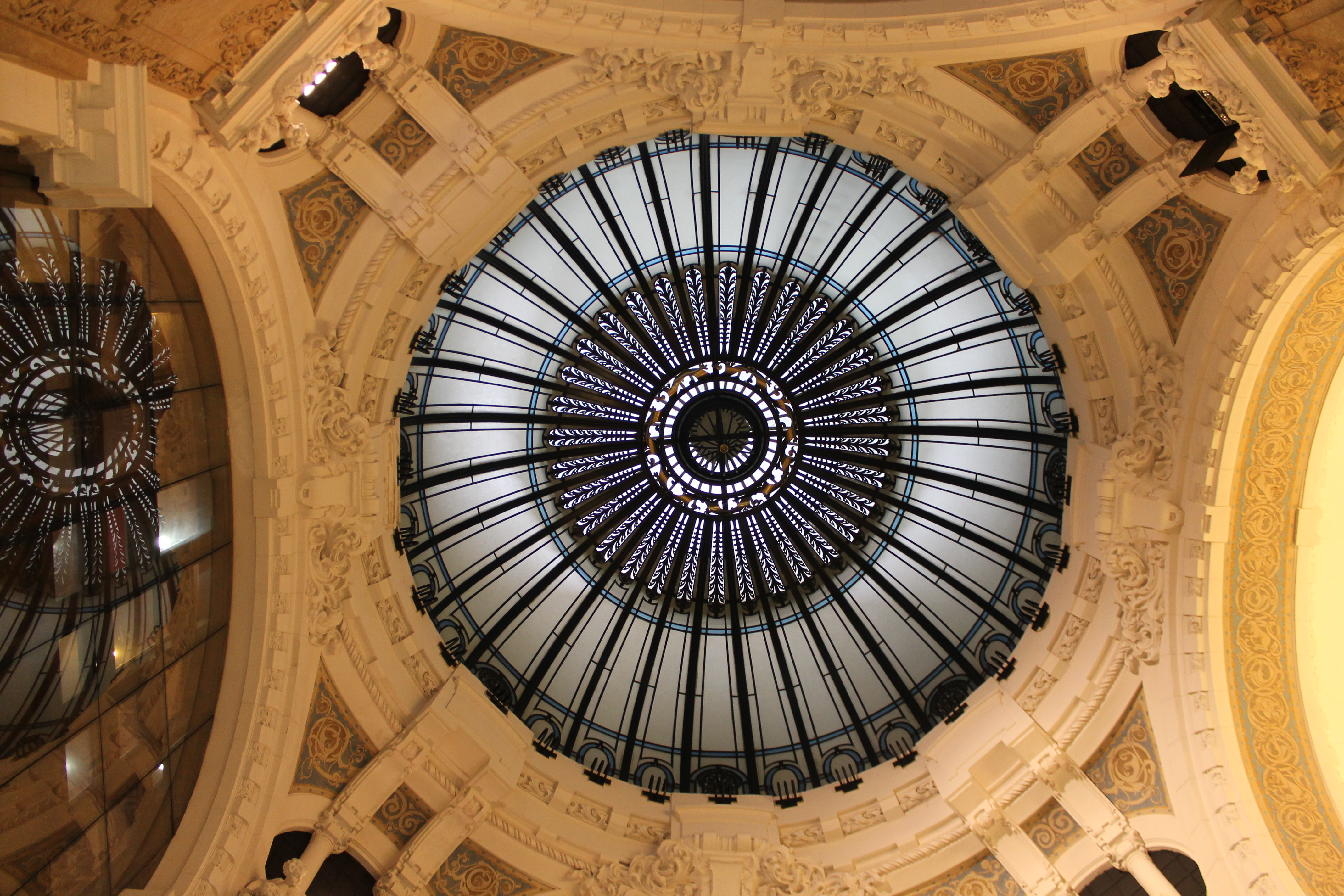 Foto del cañon corrido de la Galería General Güemes